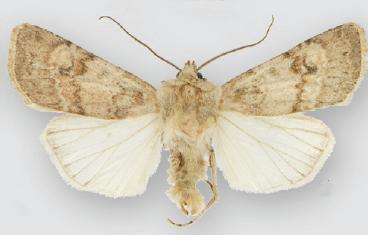 Euxoa medialis male